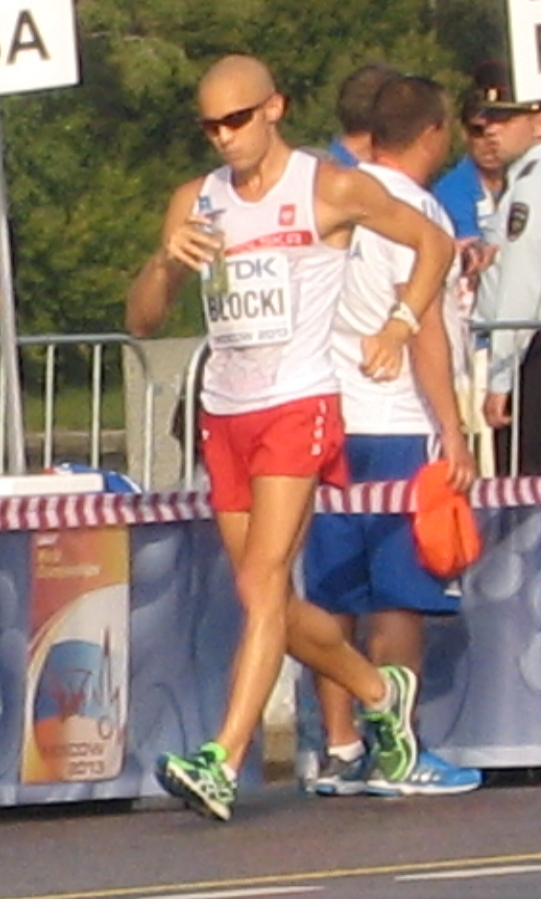 Чемпионат мира по лёгкой атлетике 2013. Ходьба 50 км, мужчины. Китаец Тянфень Си, эквадорец Андрес Чочо и поляк Адриан Блоцки